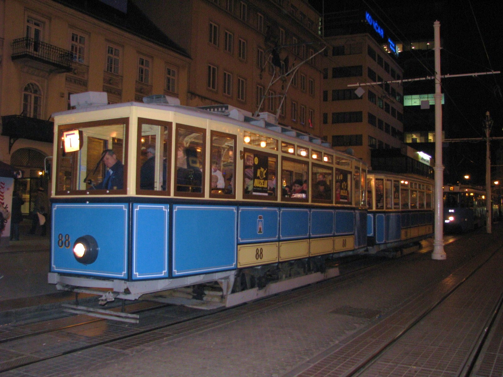 Tramvaj M-24